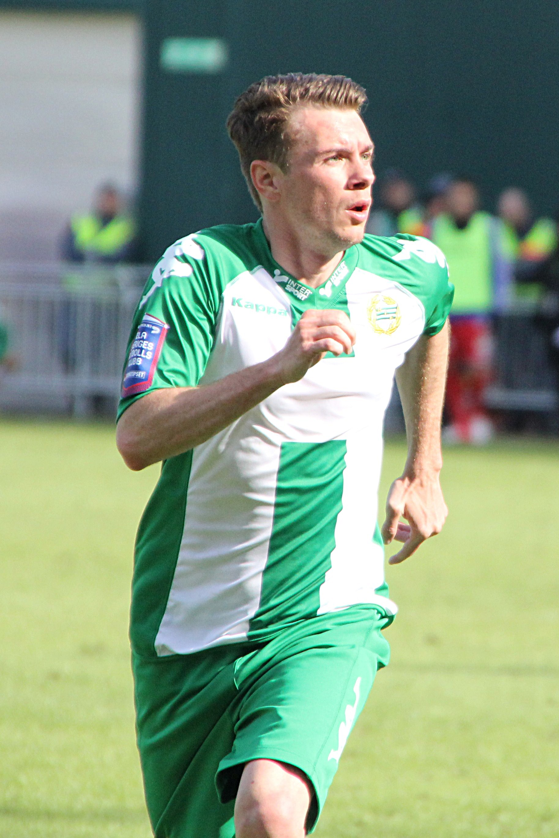 Hammarbys Nikolas Ledgerwood.